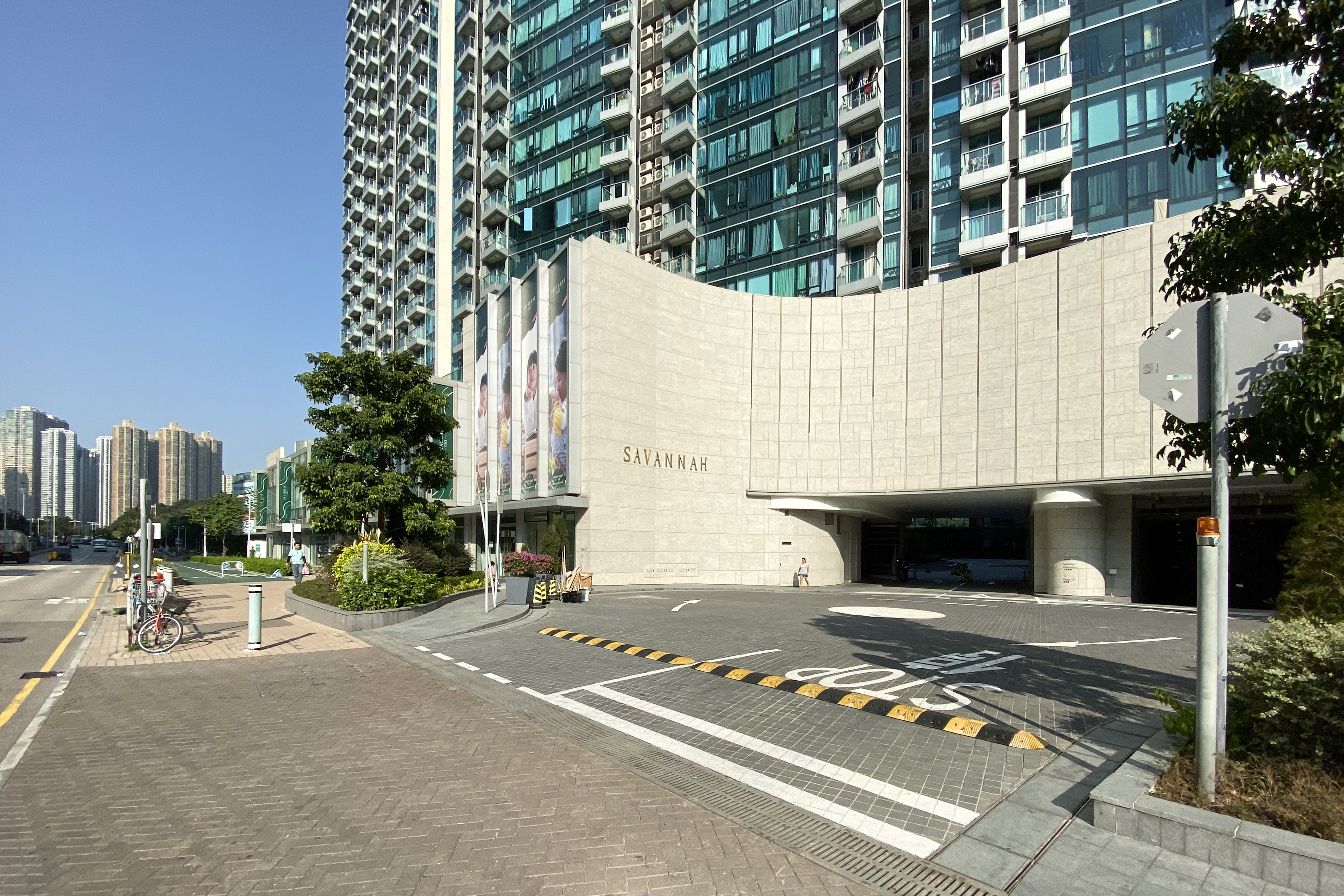 Savannah Car entrance